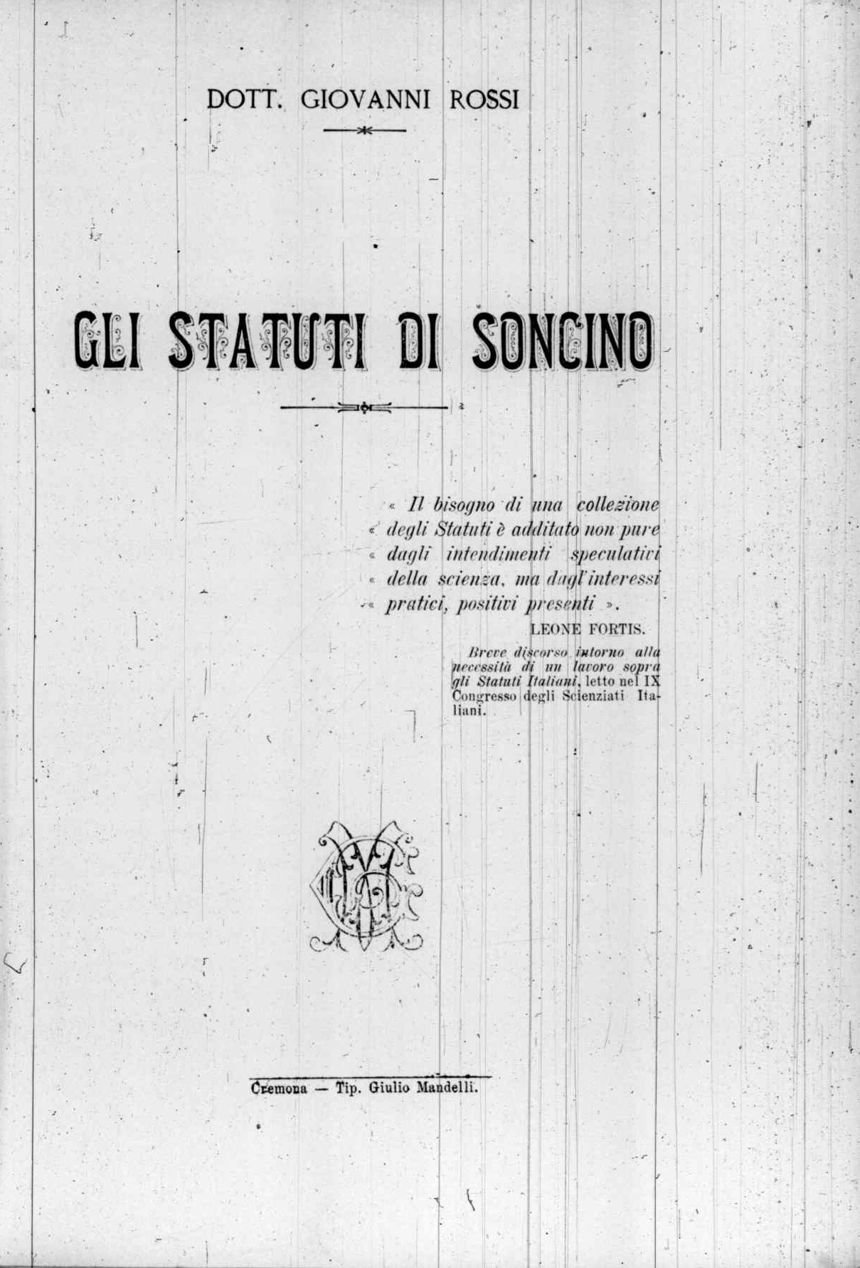 Frontespizio